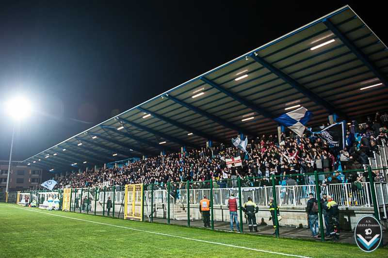 Pubblico sulla tribuna sud dello Stadio comunale Città di Gorgonzola durante la partita di calcio Giana Erminio-Unione Venezia, valida per il campionato di Lega Pro 2014-2015